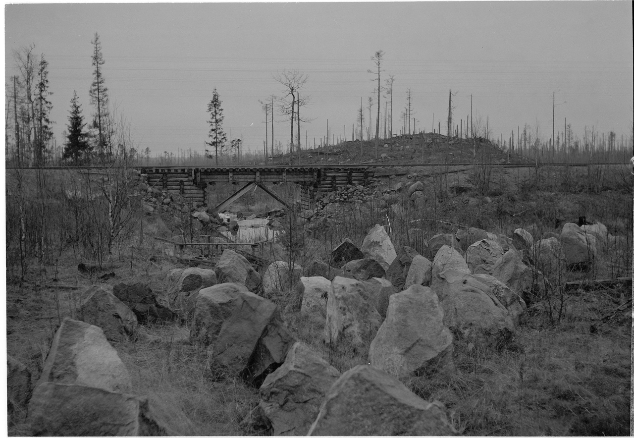 Колласйоки.